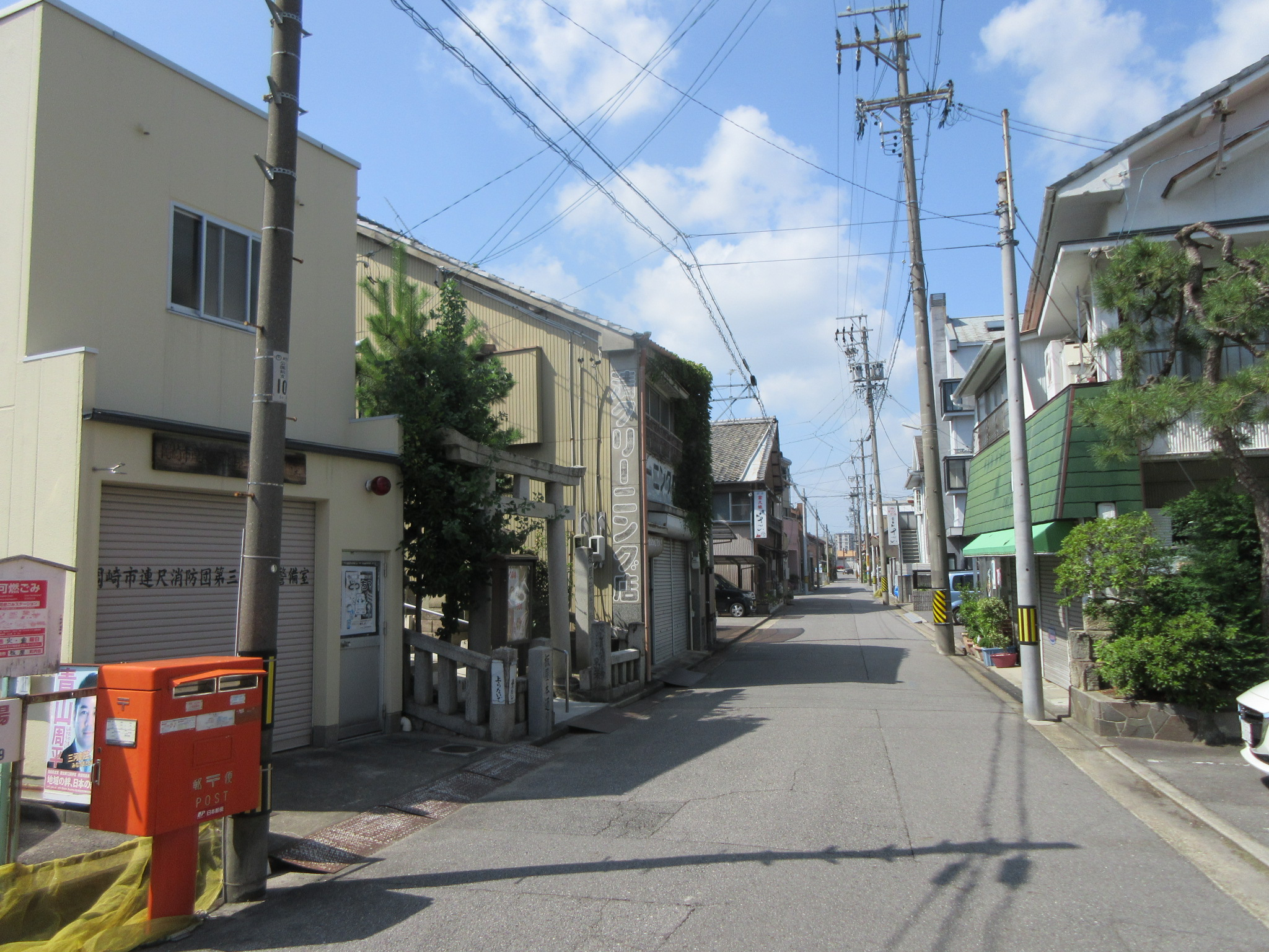 板屋本通り（岡崎市板屋町）